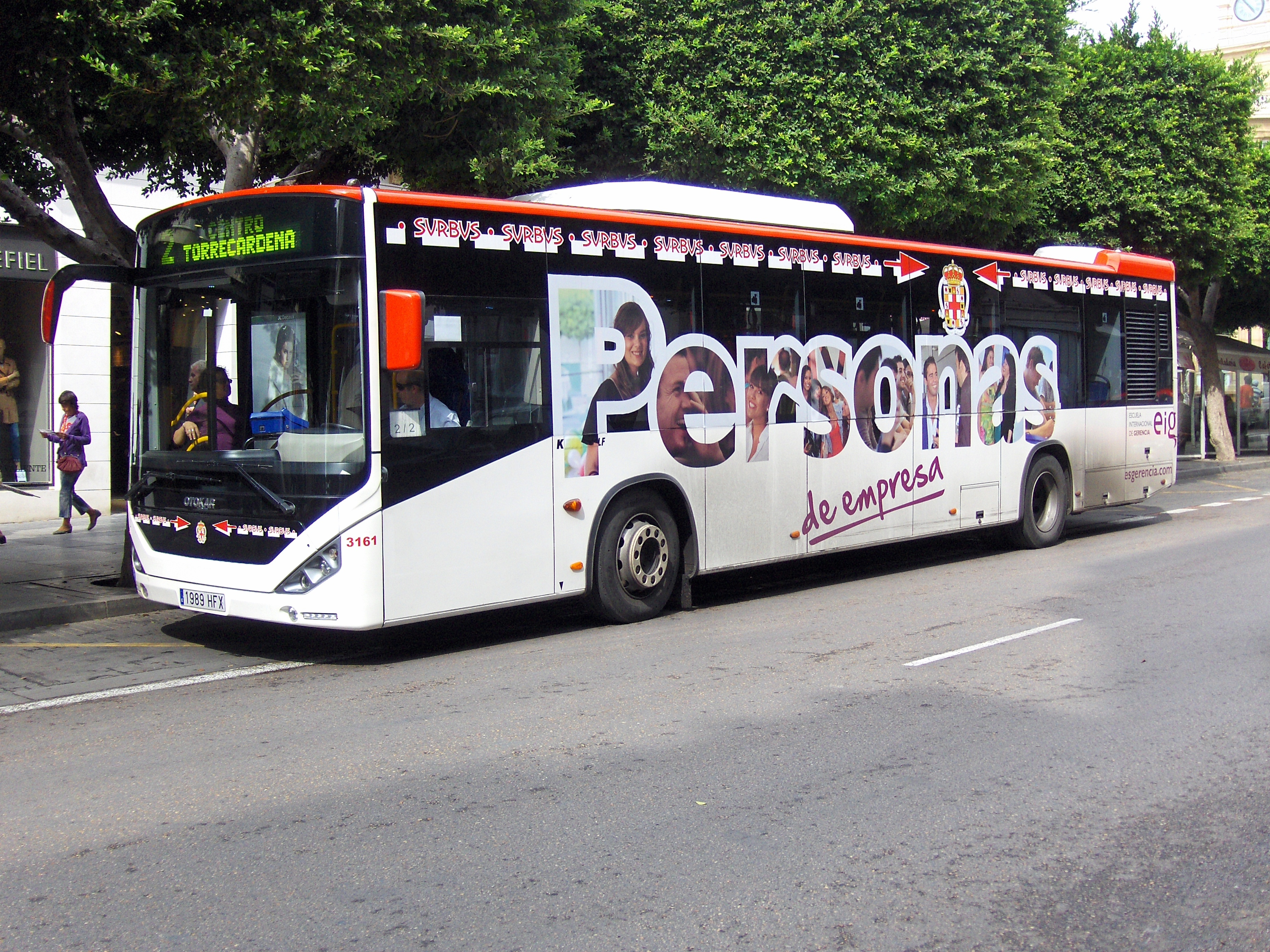 Autobús Otokar Kent 290LF sirviendo en la línea 2 de los autobuses urbanos de Almería